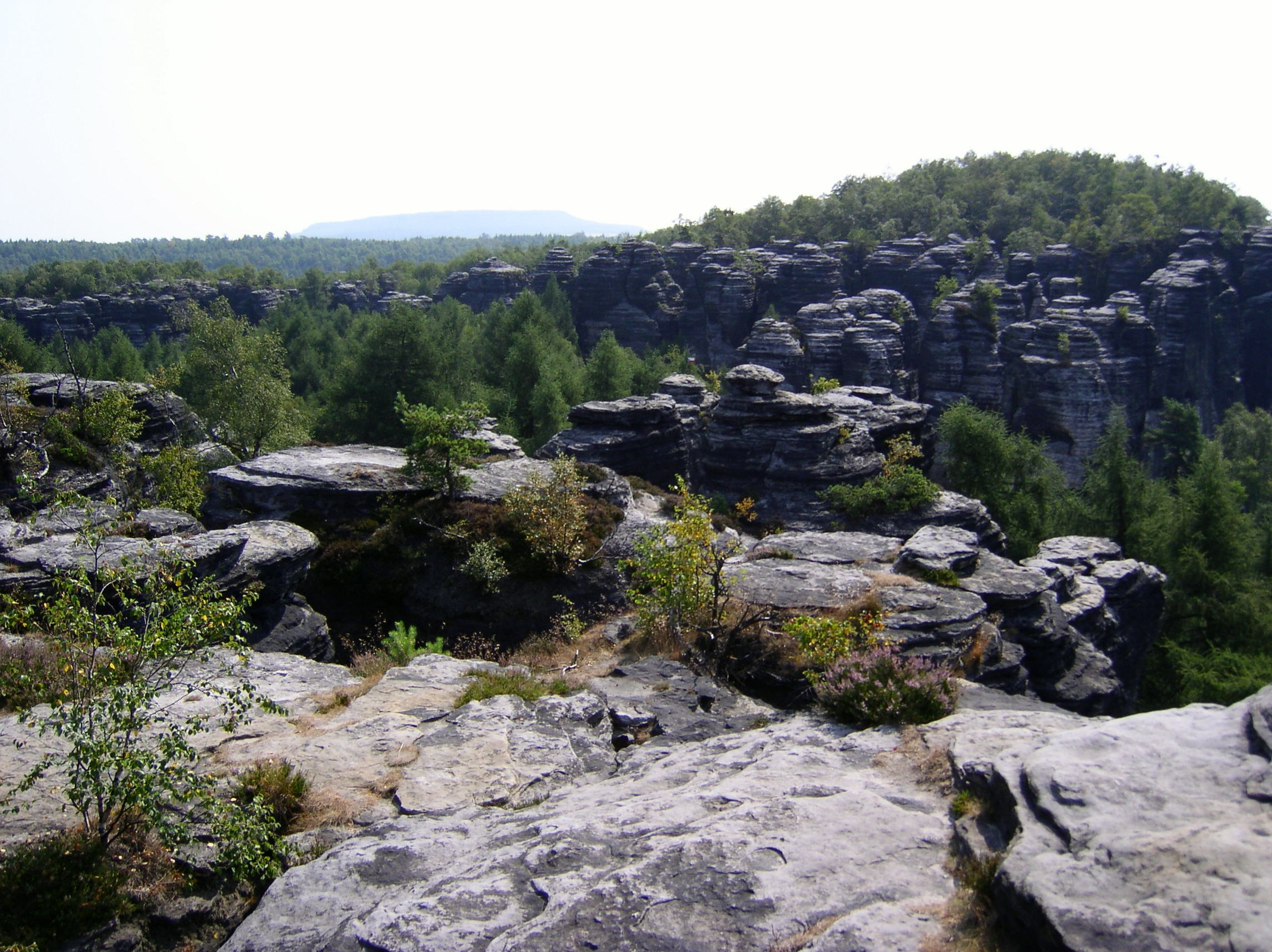 Große Tyssaer Wände